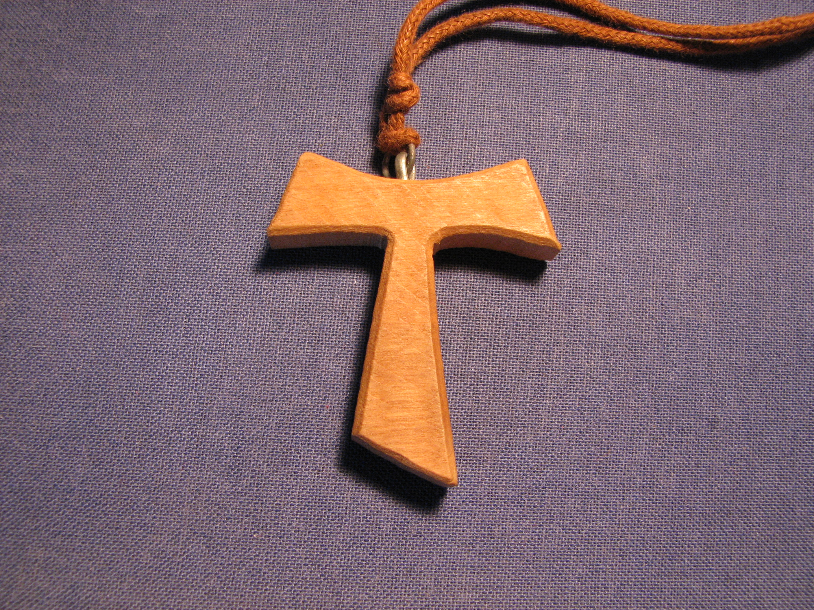 Franciscan Tau